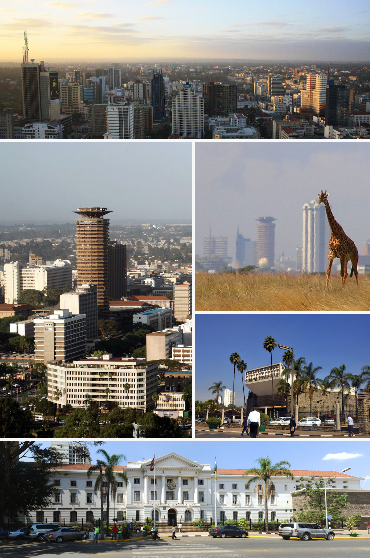 Nairobi